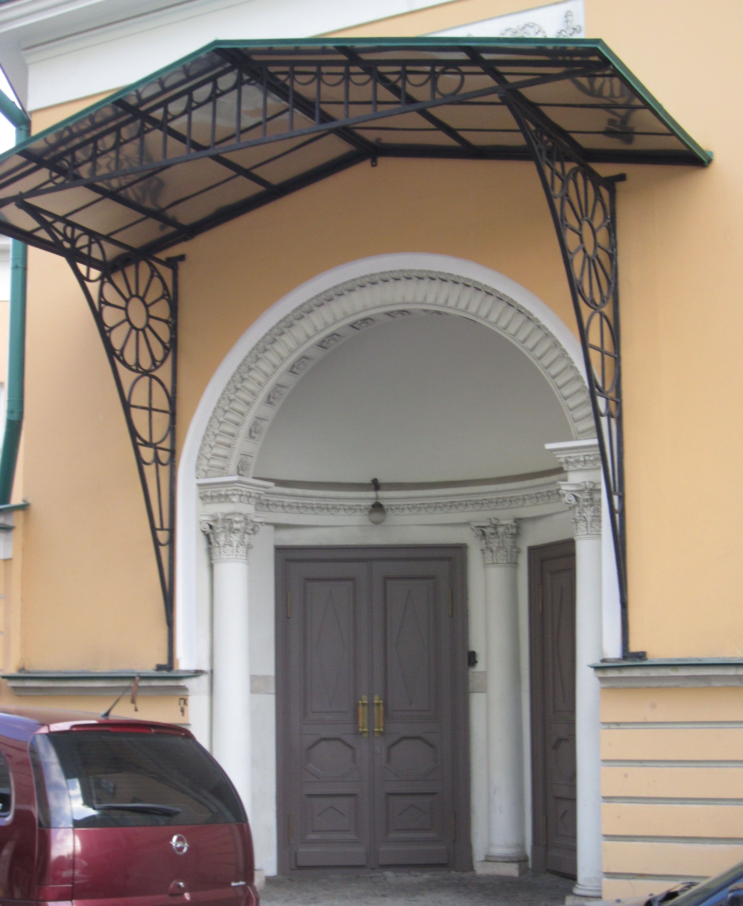 Парадный подъезд дома усадьбы Муравьёва-Апостола со стороны улицы Александра Лукьянова